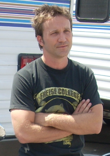 Breckin Meyer